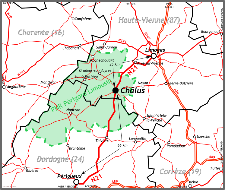 Carte de situation de Châlus (Haute-Vienne, France)